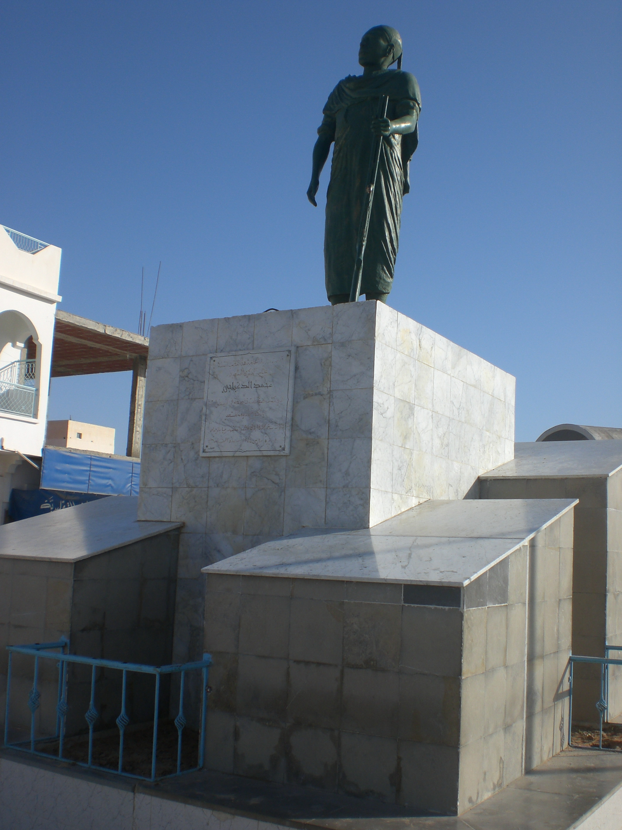 Statue de Momamed Daghbagi à El-Hamma